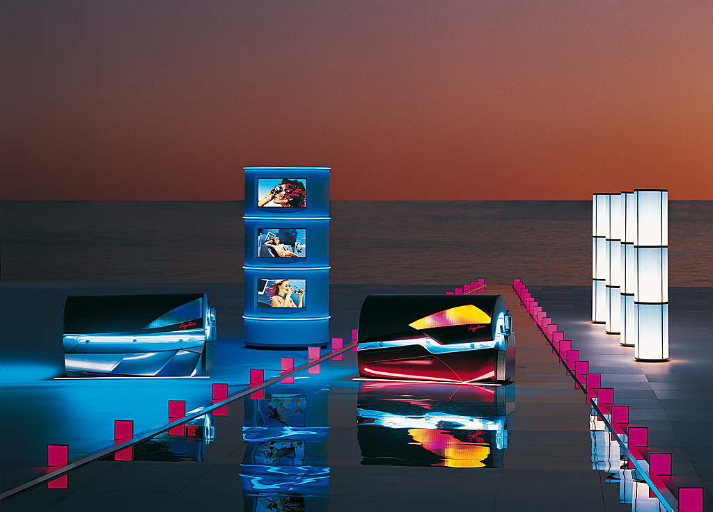 Kampagne für die Firma Ergoline